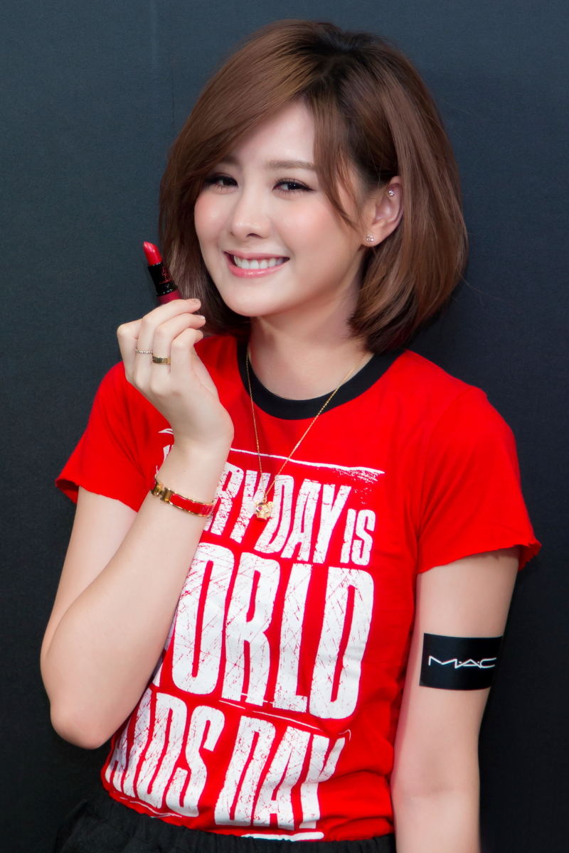 安心亞於MAC宣傳活動